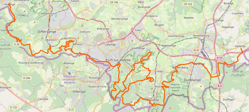 Streck vum Süd-Pad 2